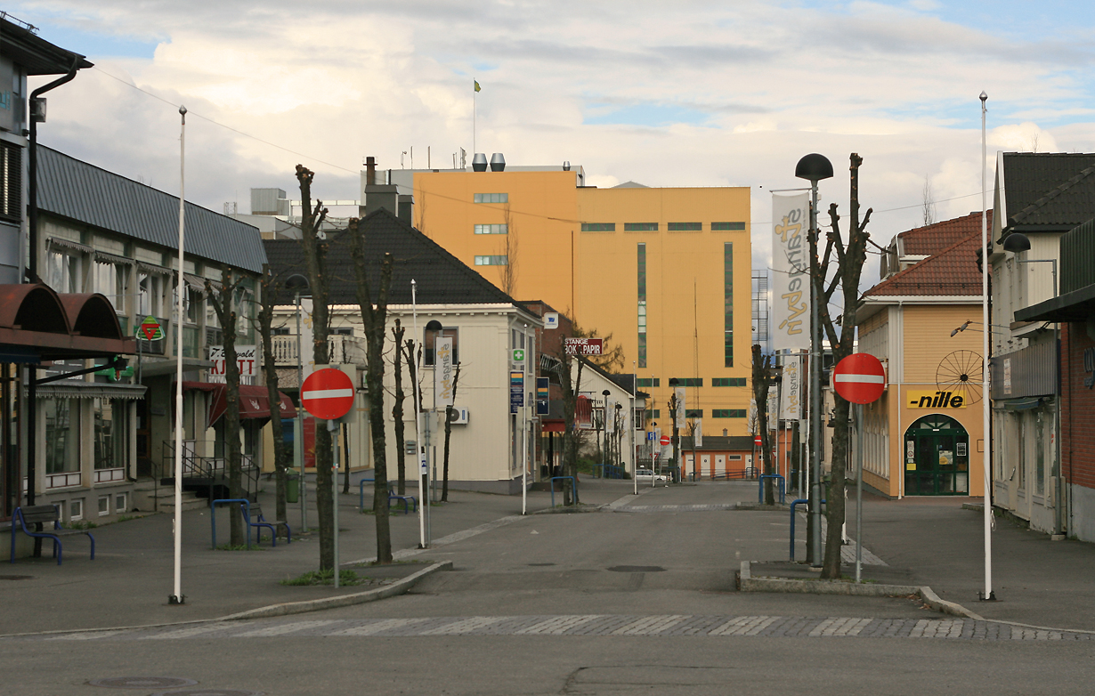 Stange sentrum (Storgata).